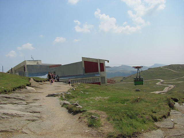 Vedere platoul Bucegi si telecabinele Babele-Busteni și Babele-Pestera